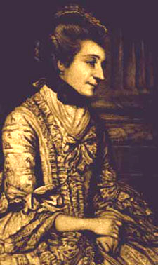 Portrait of Elizabeth Montagu-née Robinson- (1718-1800)